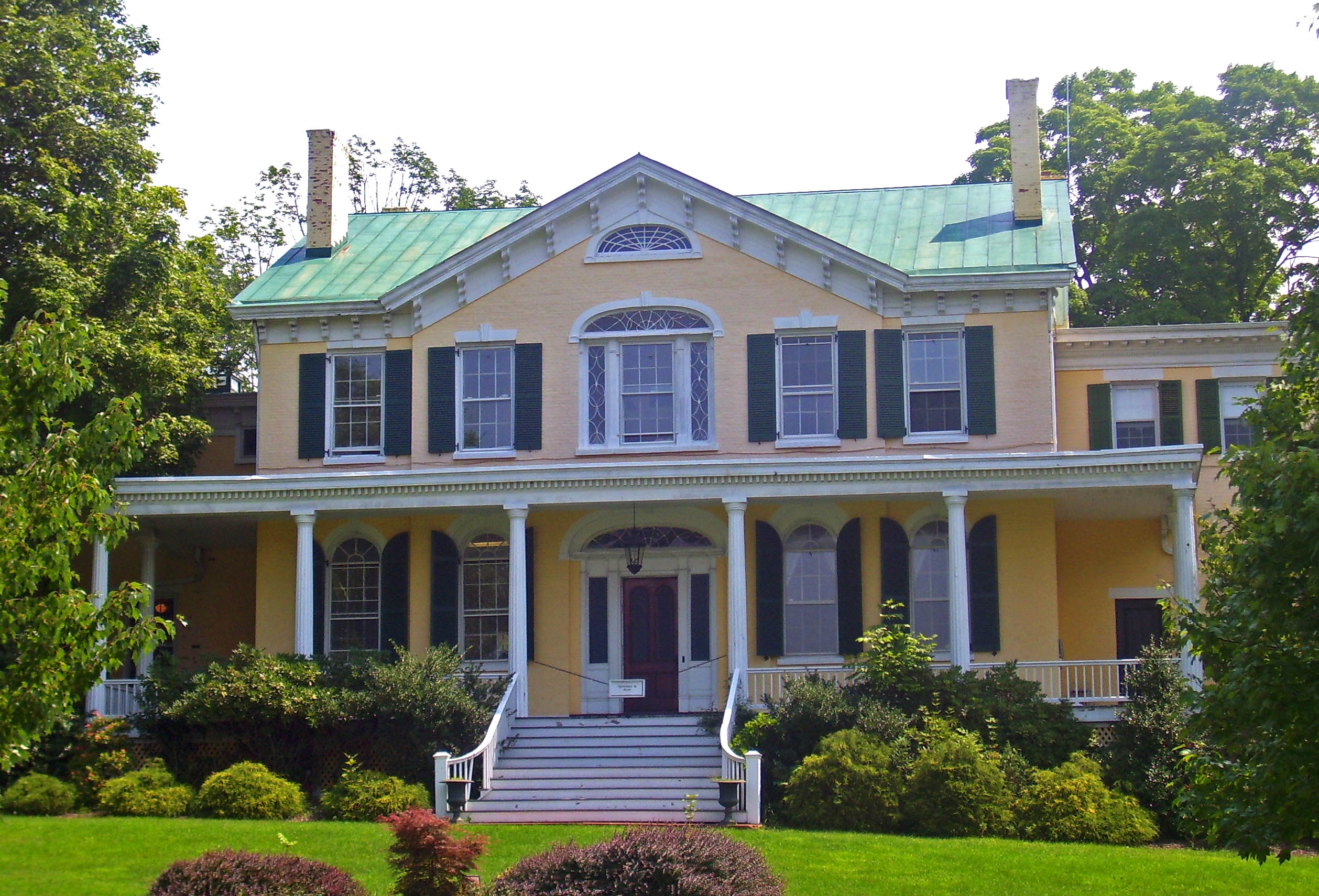 Goshen, NY, USA, village hall